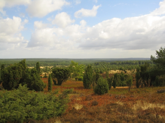 Ein Blick über die Lüneburger Heide mit Wacholder (Juniperus communis).